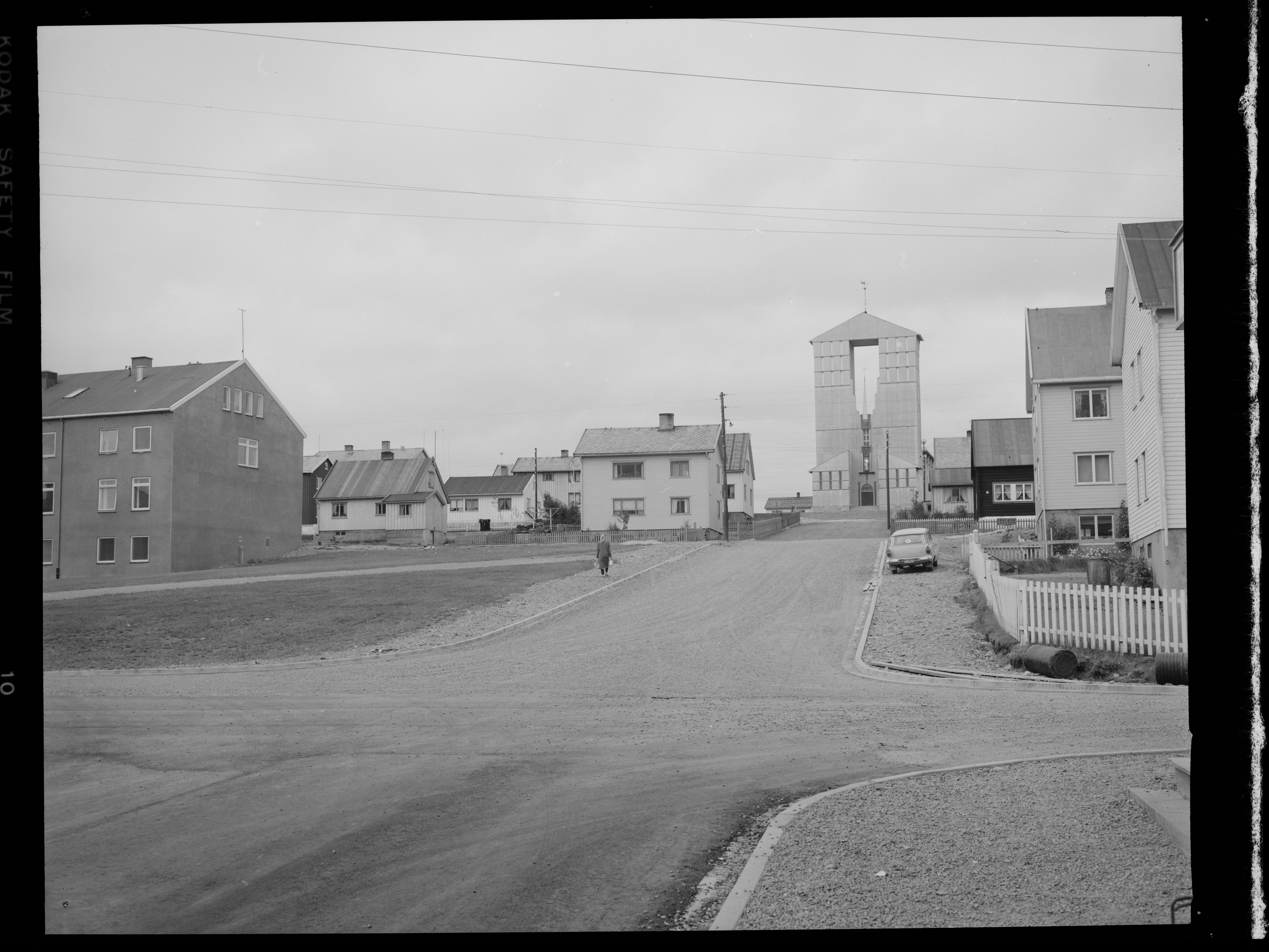 Bildet er hentet fra Nasjonalbibliotekets bildesamling. Anmerkninger til bildet var: Fotograf: LS Vadsø, Vadsø, Finnmark